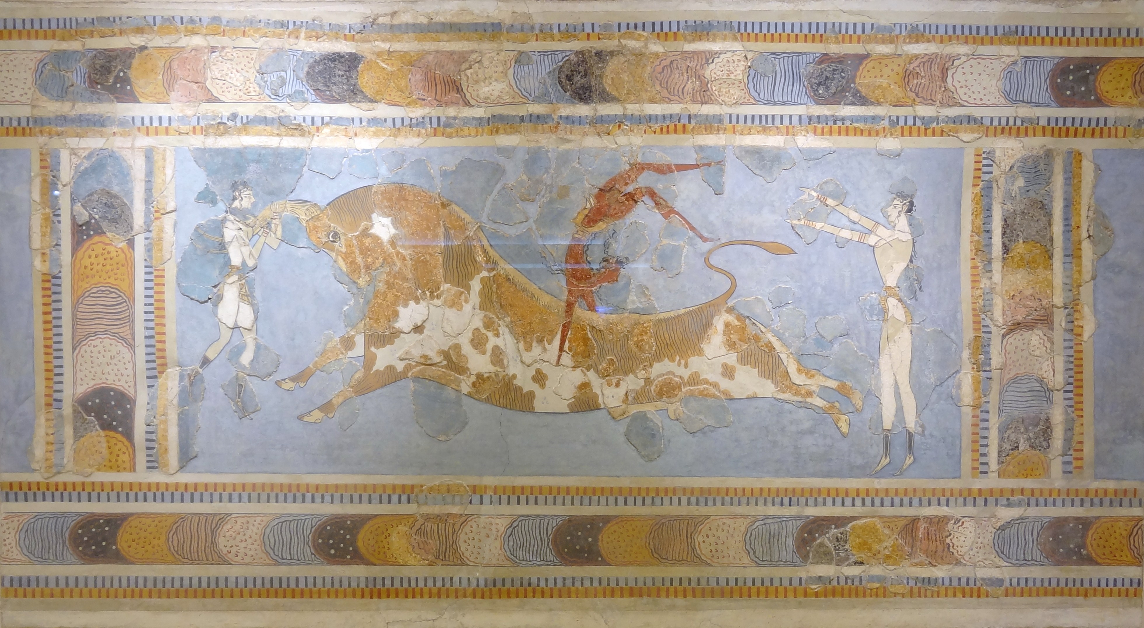 Stiersprungfresko (1600–1450 v. Chr.) aus dem Palast von Knossos, ausgestellt im Archäologischen Museum Iraklio, Kreta, Griechenland